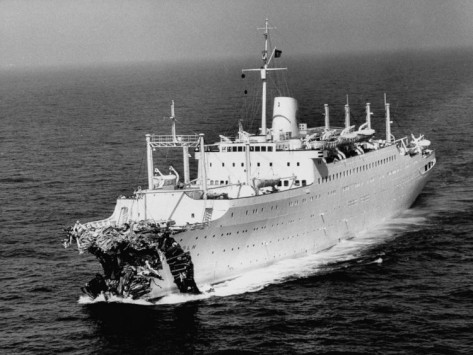 Возвращение лайнера «Стокгольм» в Нью-Йорк после столкновения с лайнером «Андреа Дориа» 25.07.1956 года